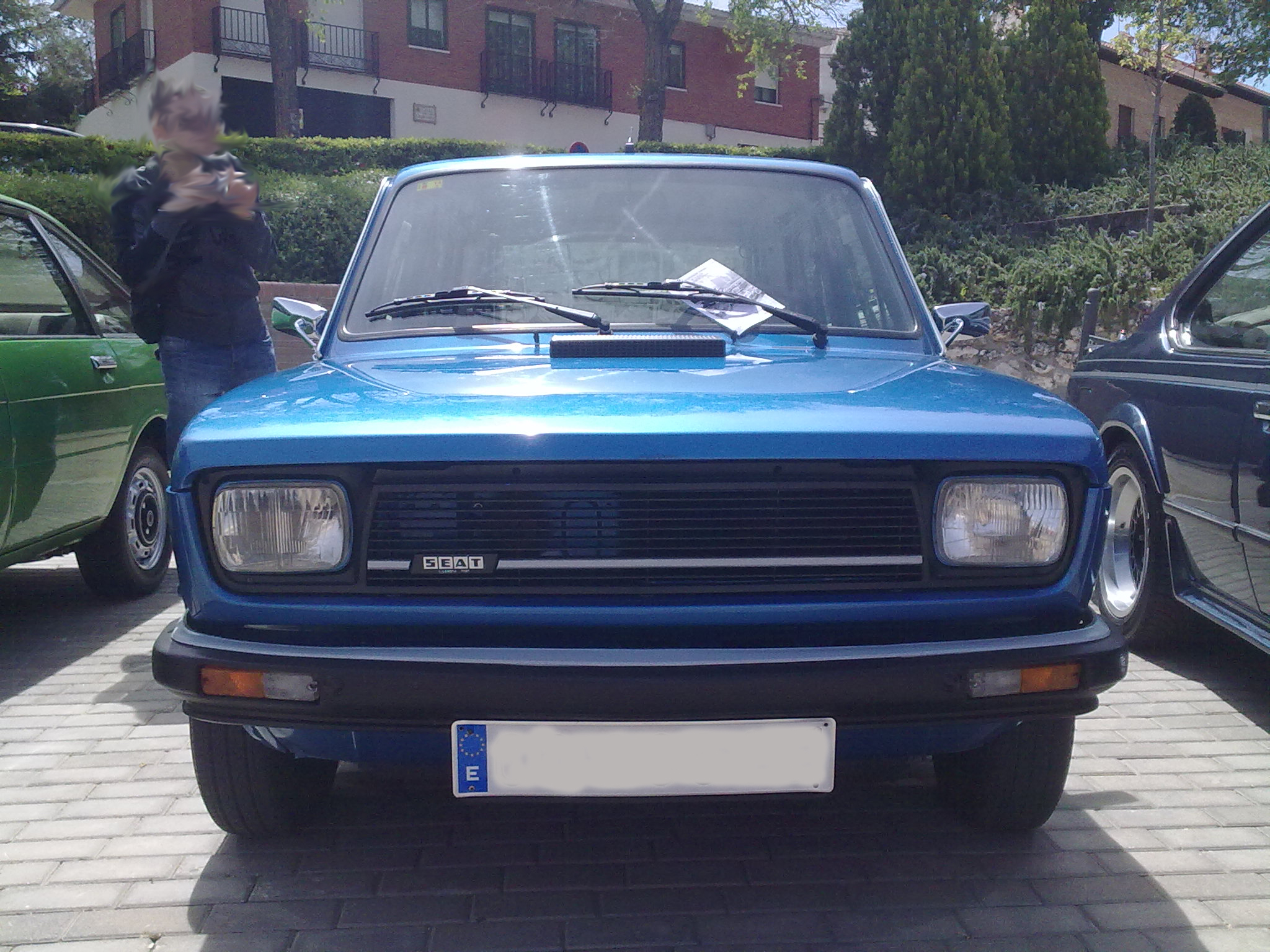 SEAT 127 concentración navalcarnero 2014